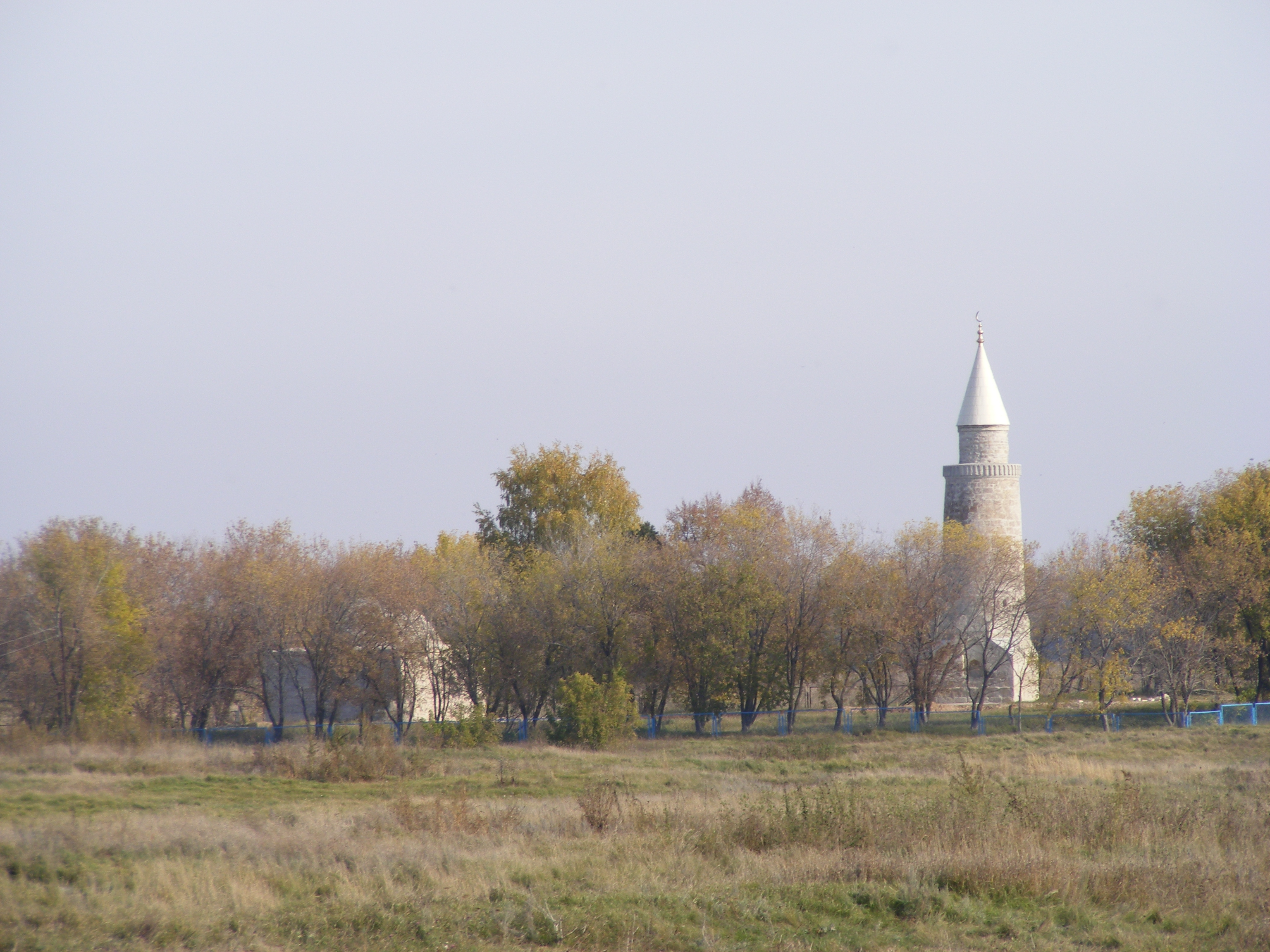 Small minaret and khans' mausoleum in Bolgar, Tatarstan, Russia